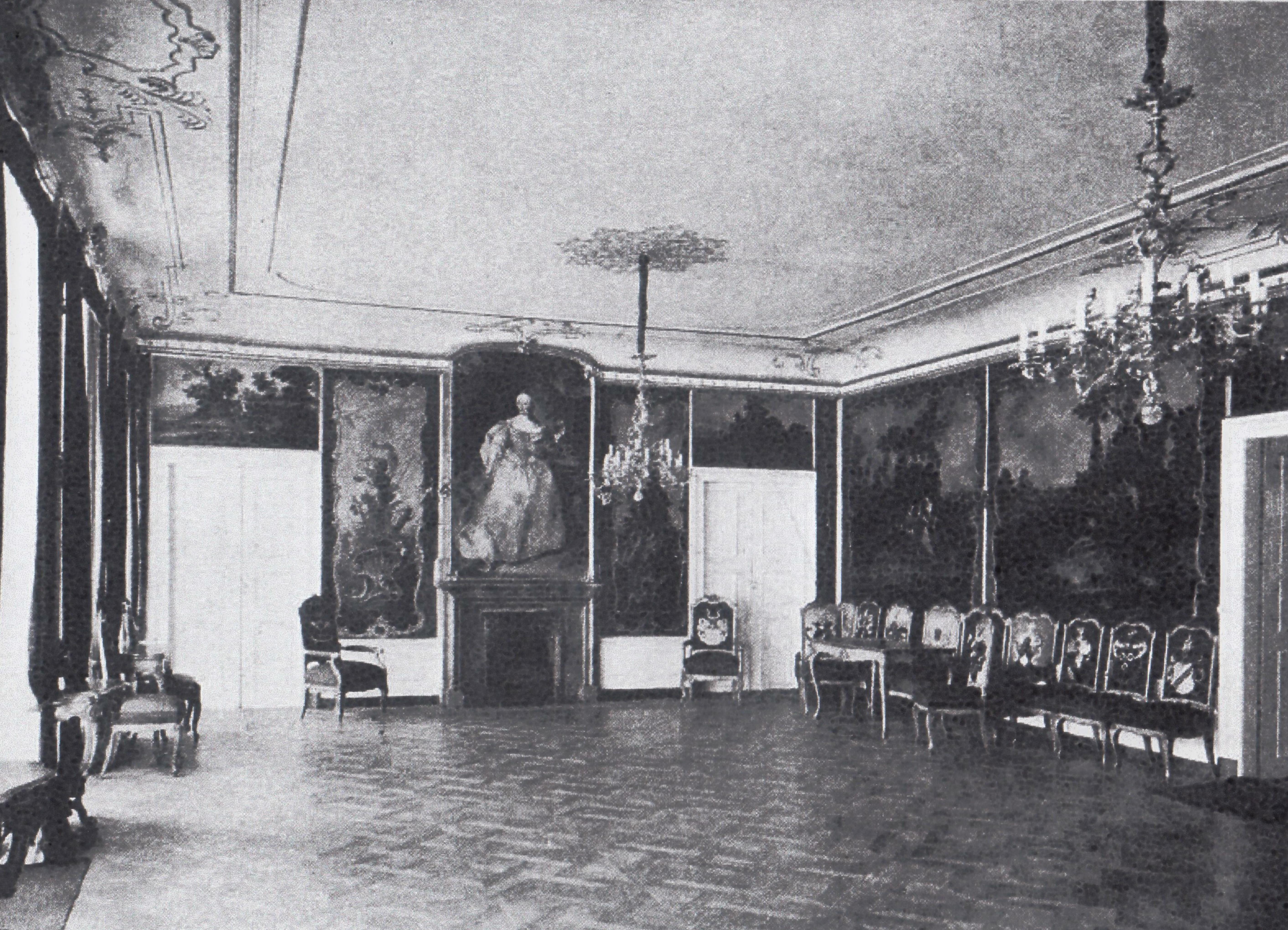 scan aus: Bau und Kunstdenkmäler des Königreiches Sachsen Heft 37, Amthauptmannschaft Großenhain(Land), bearbeitet von Cornelius Curlitt, Verlag Meinhold und Söhne 1913, S.131; Schloss Lauterbach Gartensaal.